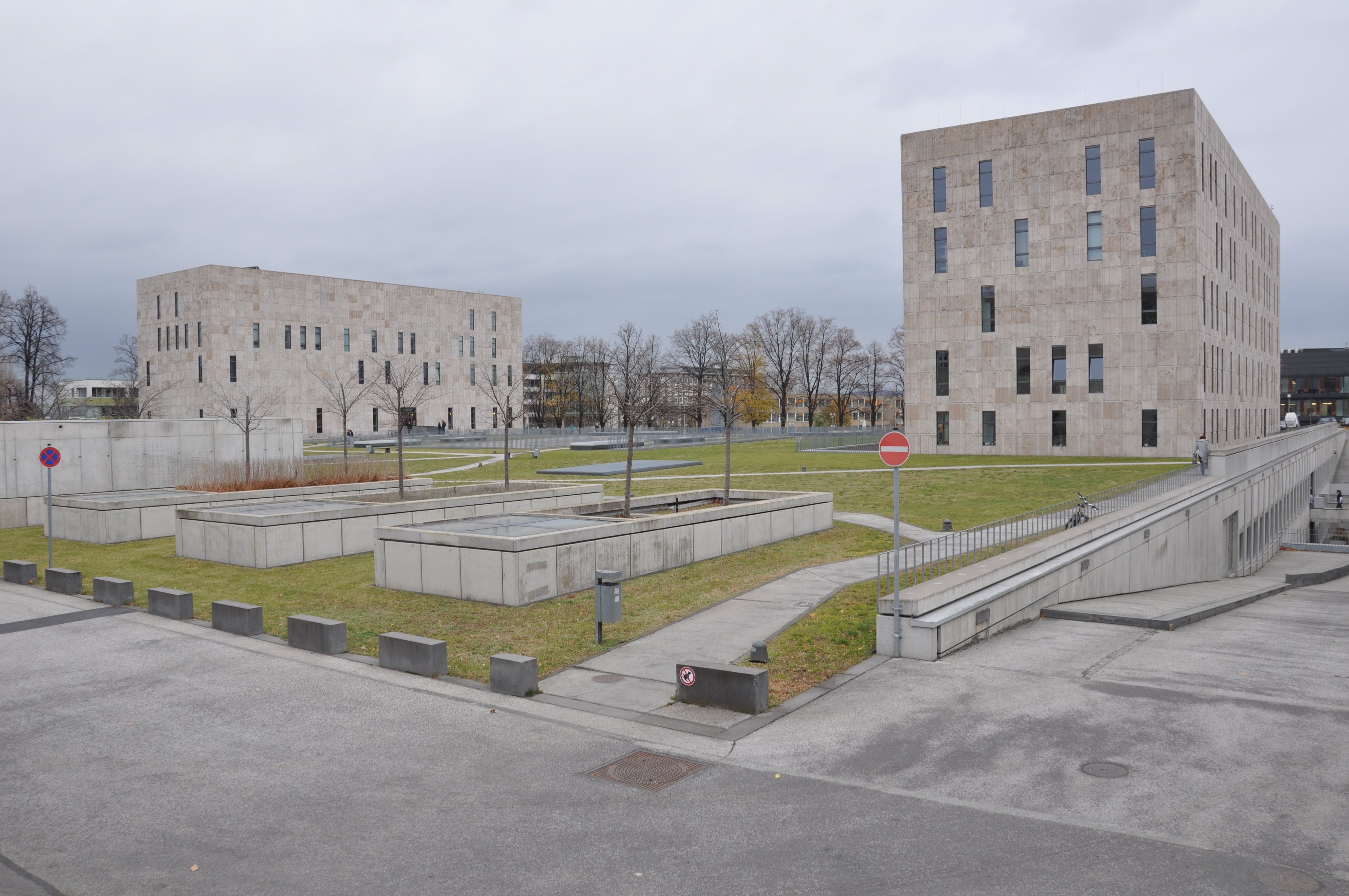 Sächsische Landesbibliothek – Staats- und Universitätsbibliothek Dresden (SLUB)